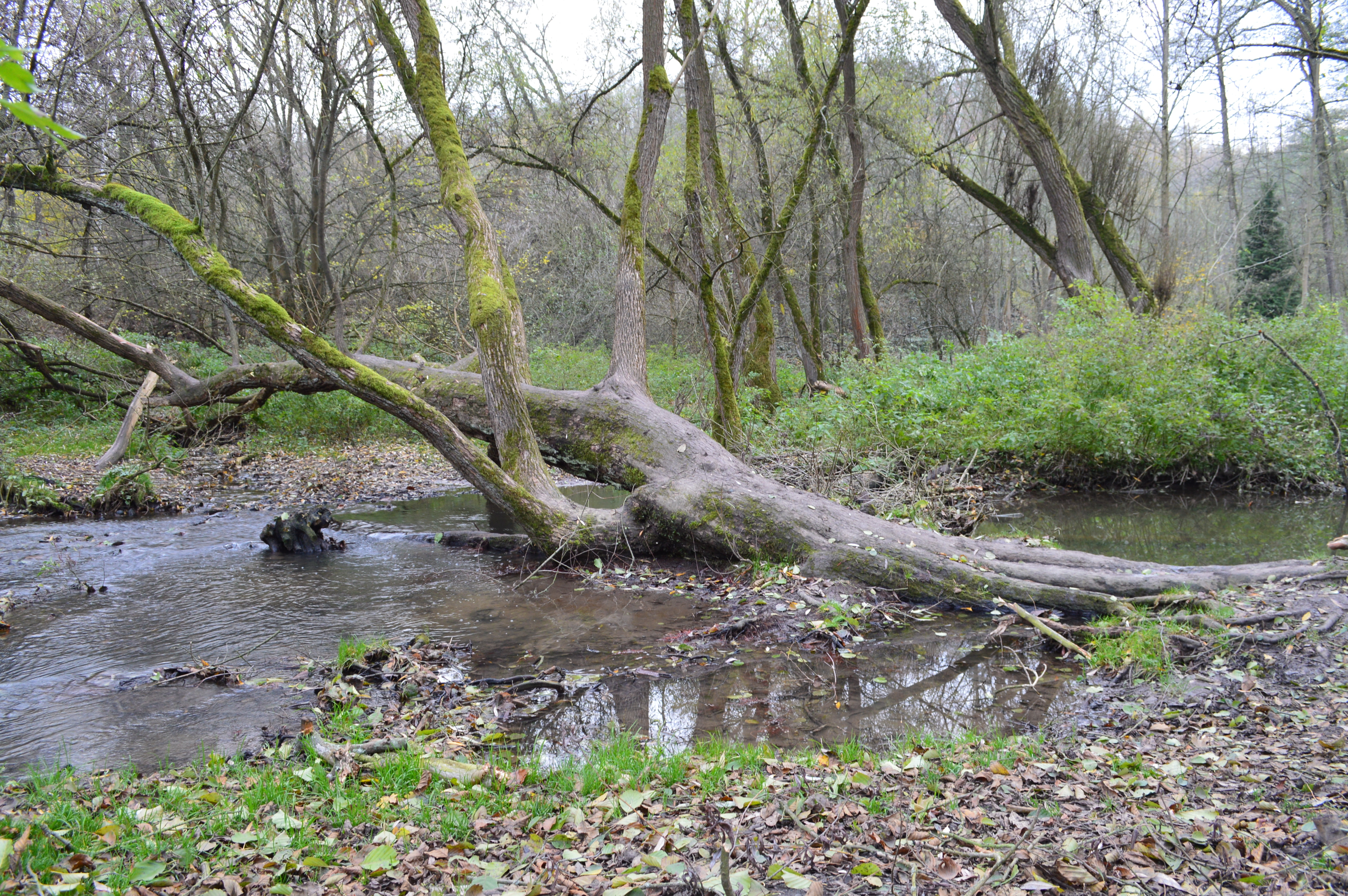 Přirozená sukcese probíhající v potoční nivě